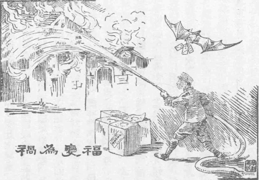 商团事变《福变为祸》漫画